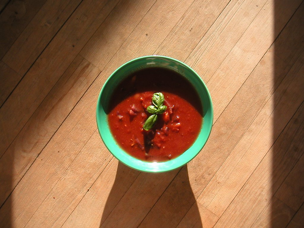 Tomatsuppe